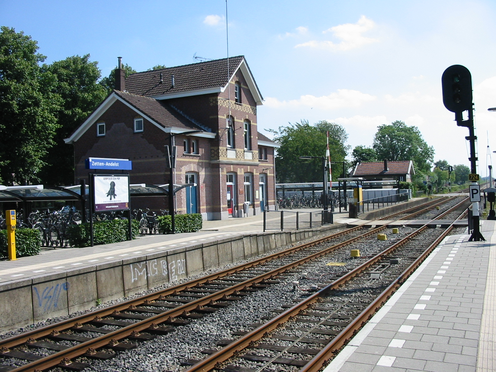 Station Zetten-Andelst